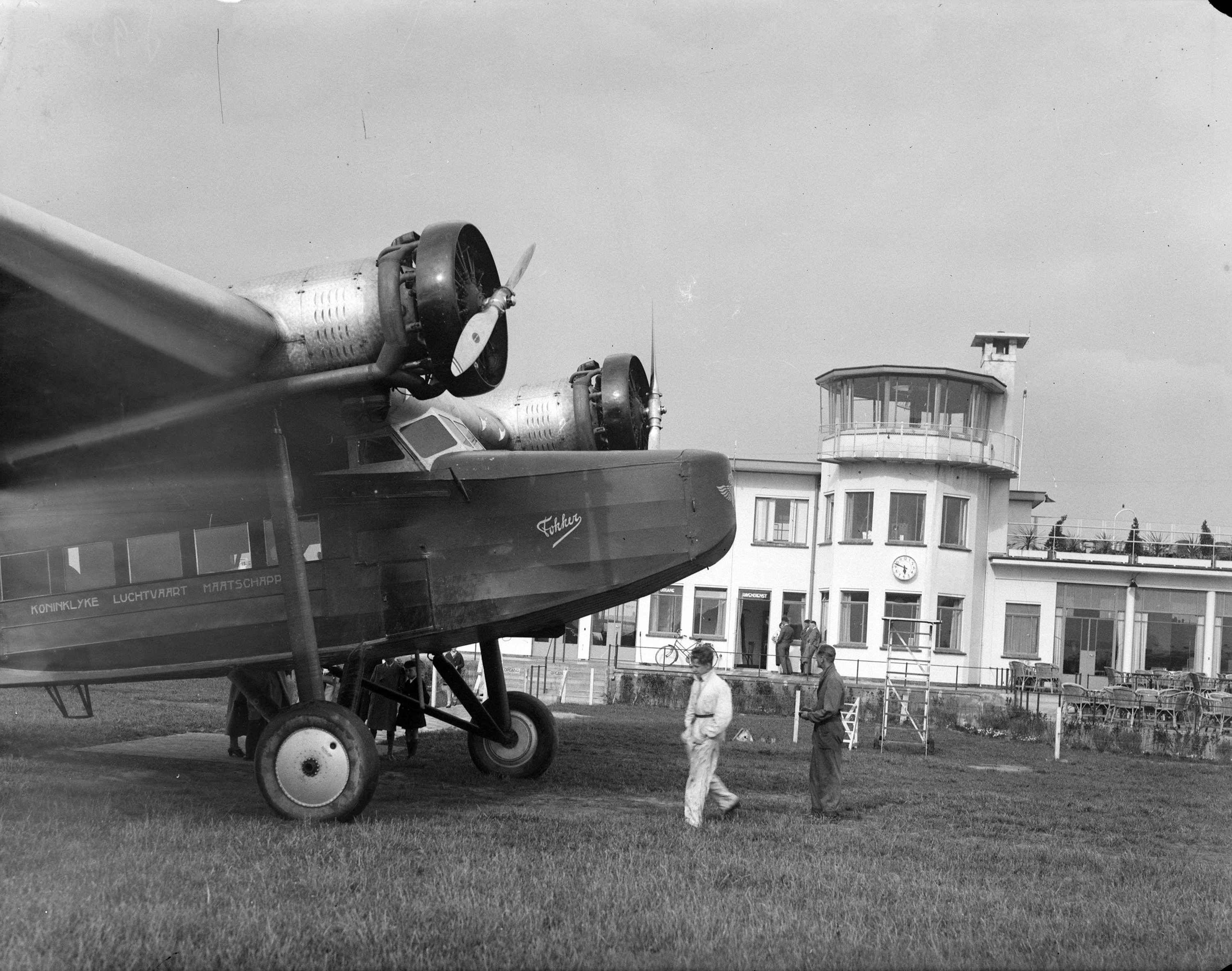 Luchthaven/ Vliegtuig: Luchthaven Eindhoven: de verkeerstoren en een Fokker van de KLM (opmerking: Oorspronkelijk bijschrift: 'Welschap, de kop van de grote vogel.')